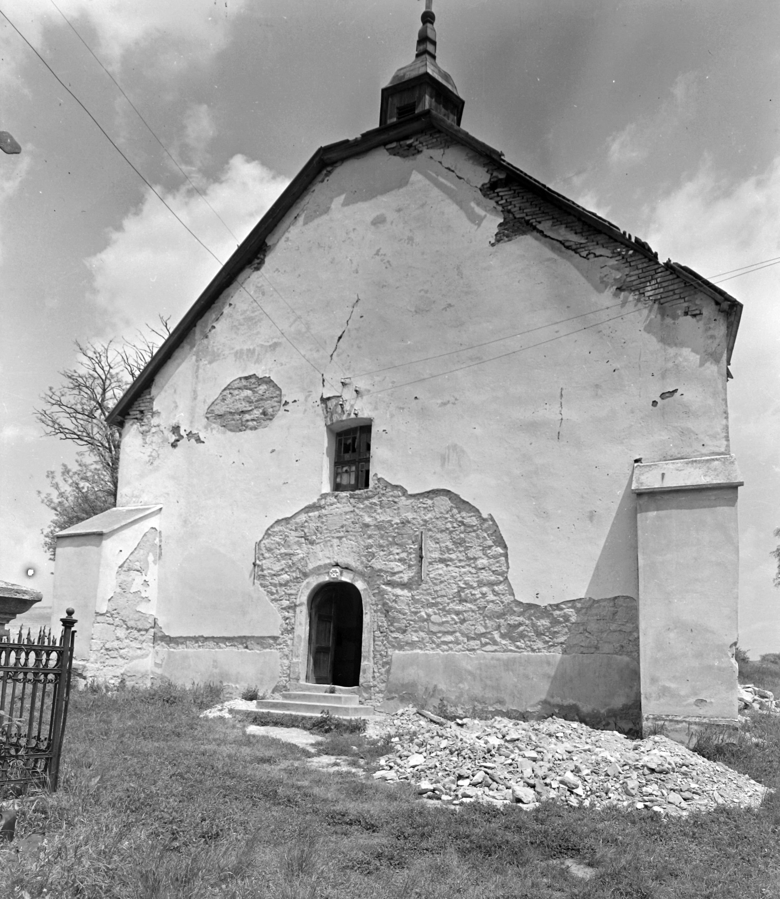 (Homokterenye), Szent Márton római katolikus templom. Location: Hungary Tags: church Title: (Homokterenye), Szent Márton római katolikus templom.